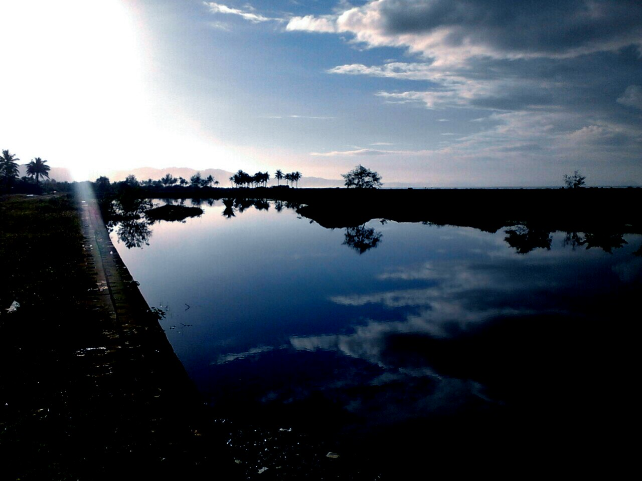 Mangrove Bulak setra